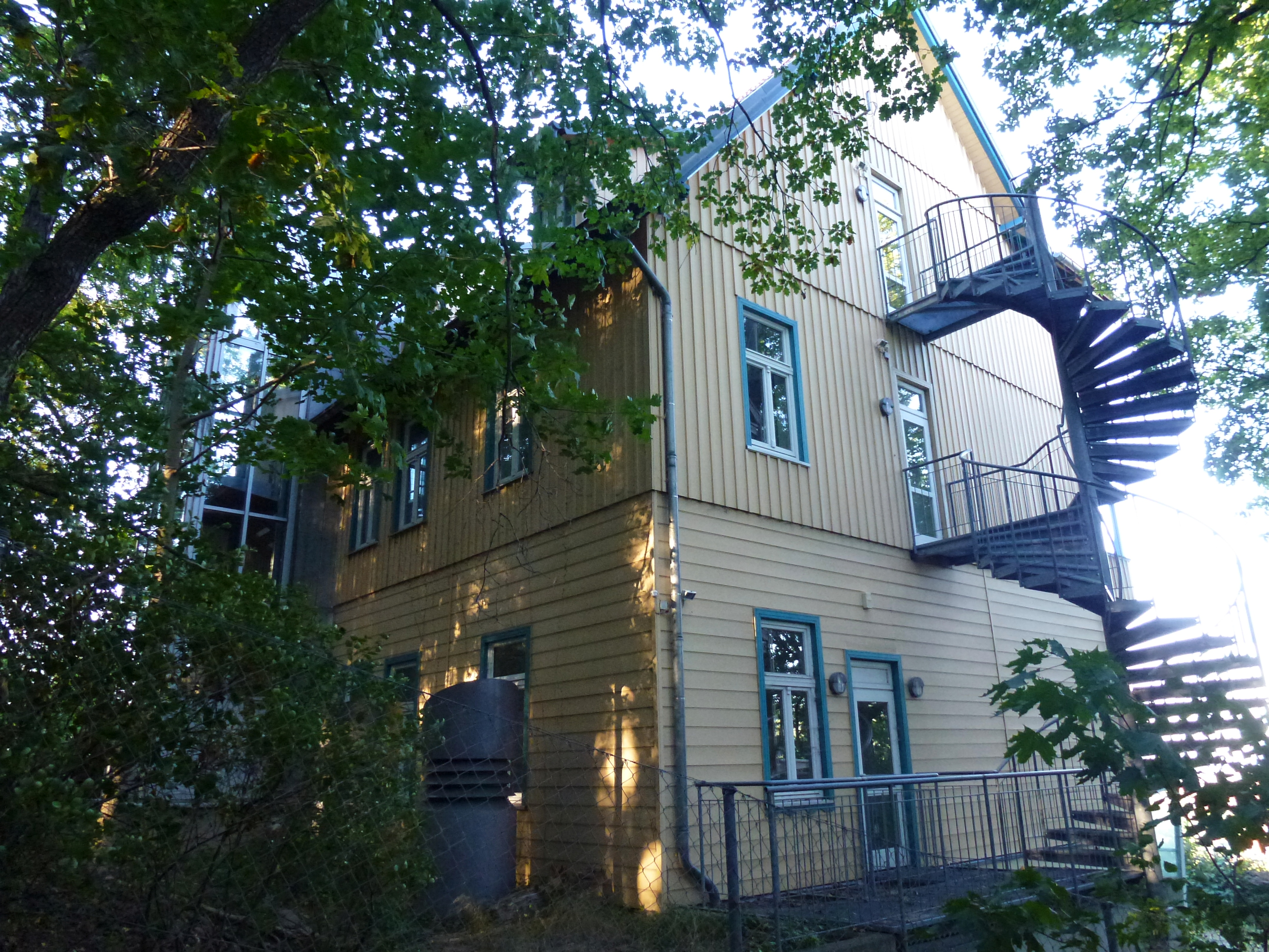 Gebäude auf dem Grundstück der Sennhütte auf dem Ratskopf in Wernigerode. Die Sennhütte wurde 1886 als Hotel eröffnet. Nach Nutzung als Kurheim, Hotel und Tagungsstätte endete im Jahr 2012 der Betrieb. Das Grundstück soll neu bebaut werden, die bestehenden Gebäude stehen unter Denkmalschutz.